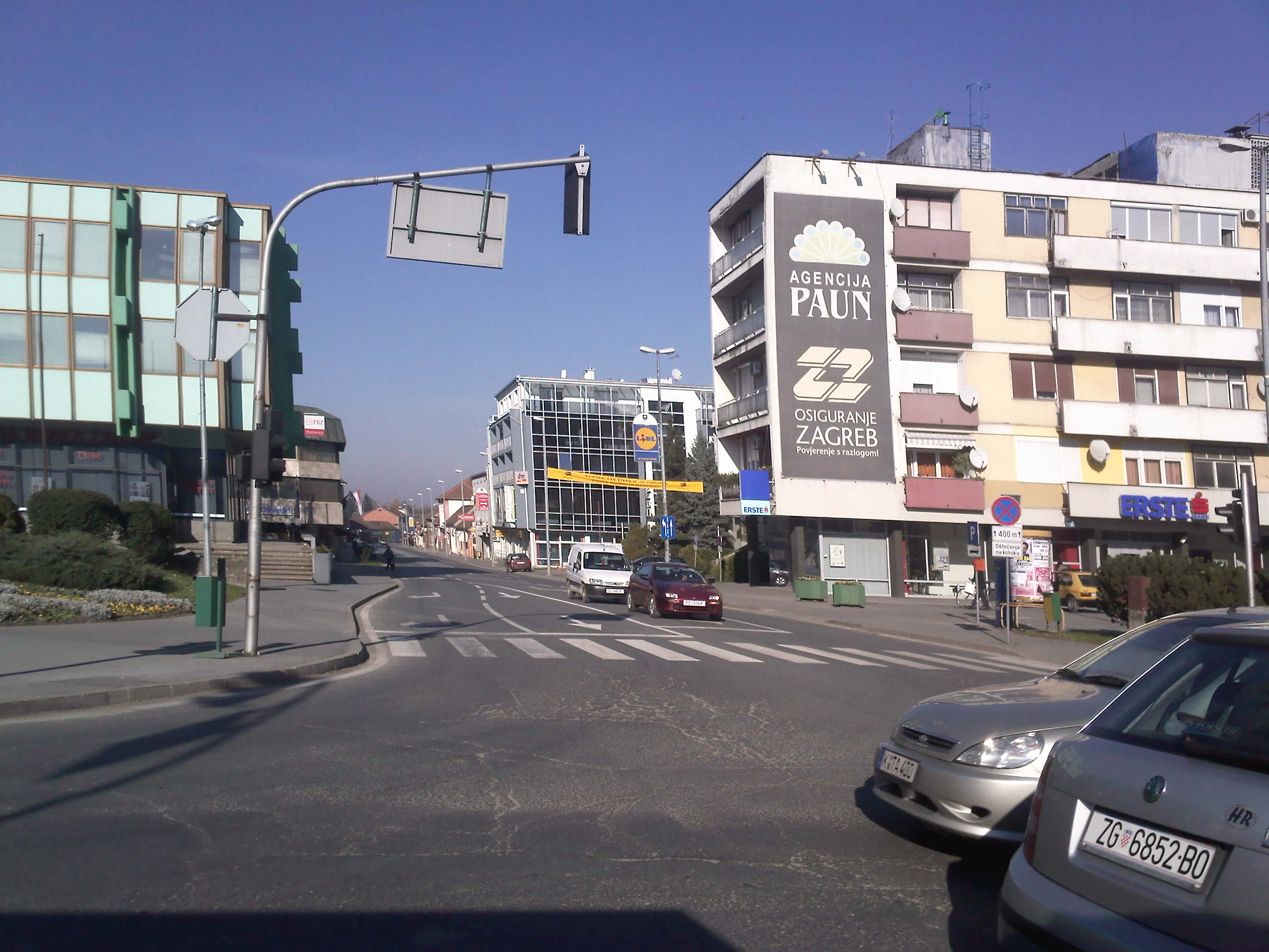 Slatina